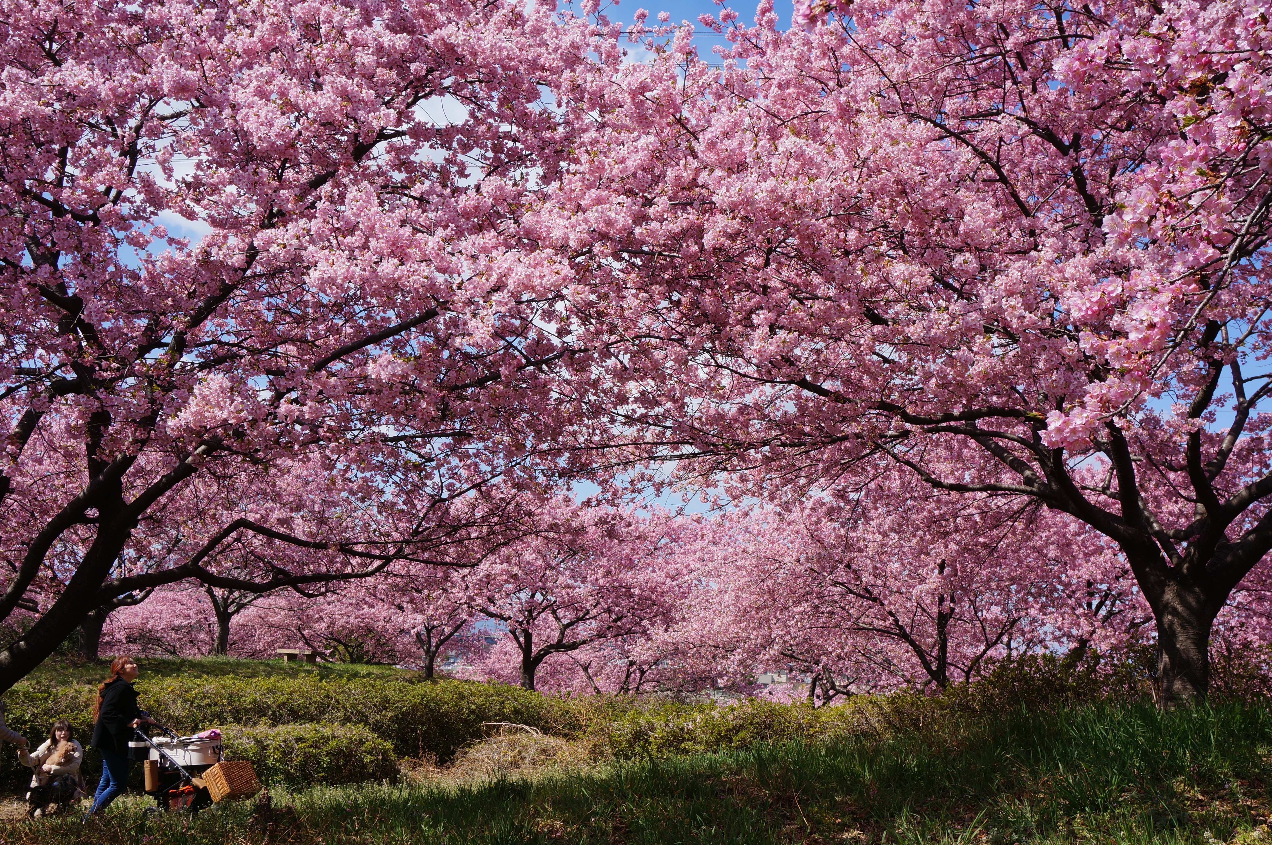 カワヅザクラ（埼玉県深谷市榛の森公園にて）